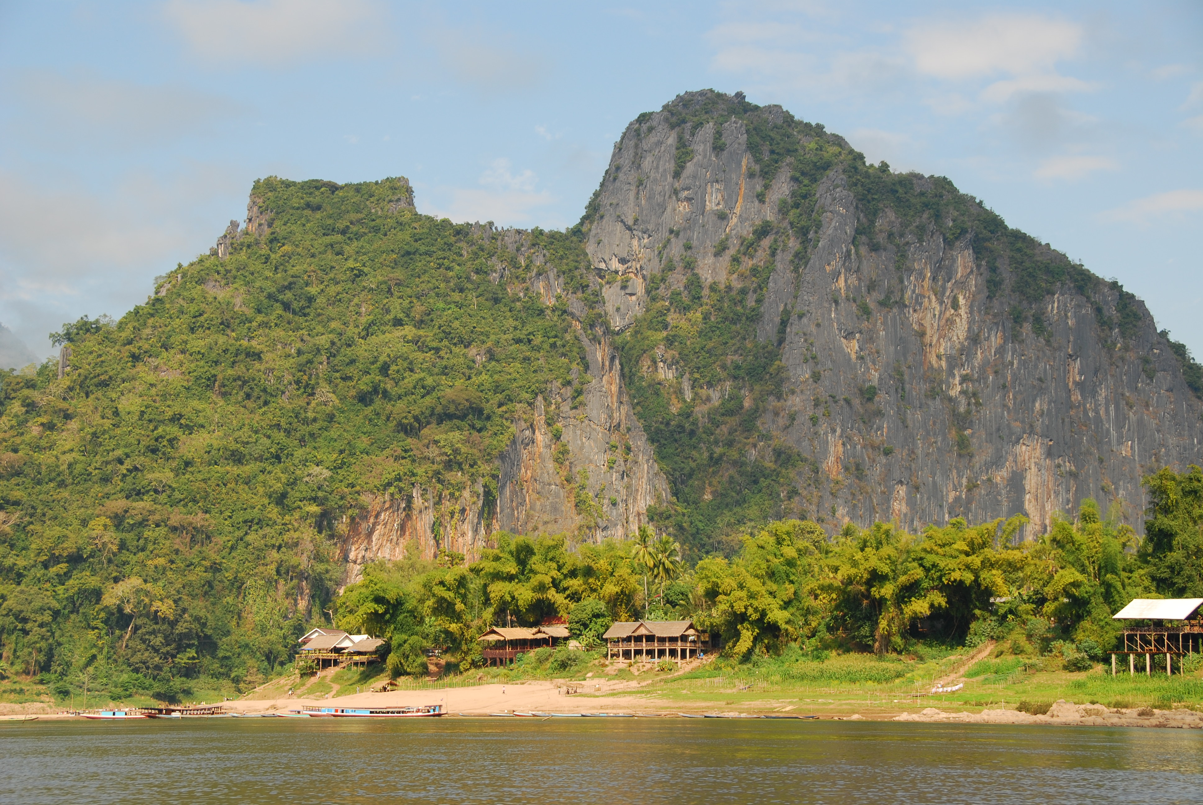 El rio Mekong, a su paso por Luang Prabang, Laos.